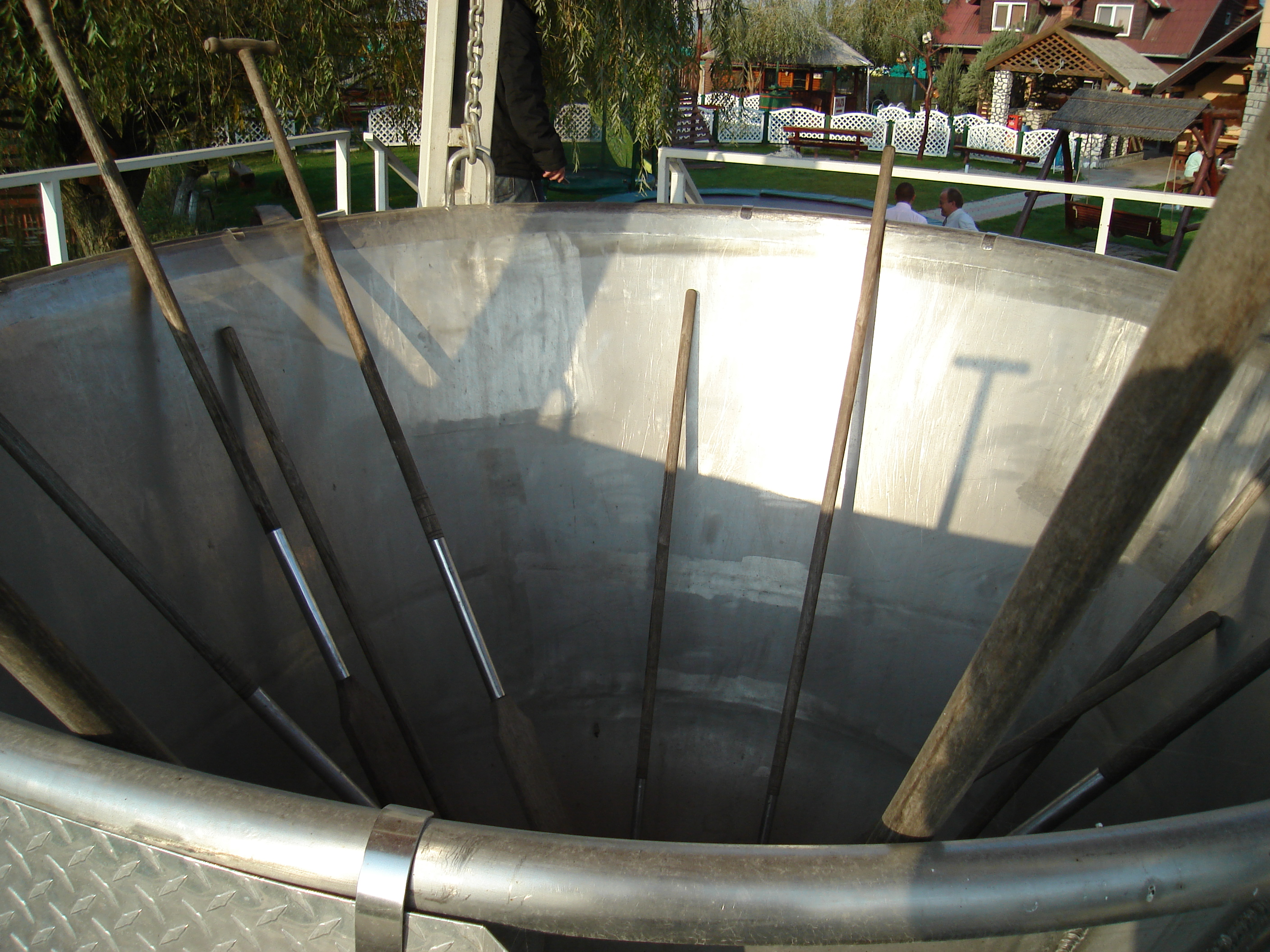 Ceaunul în care s-a preparat cel mai mare volum de gulaş din lume